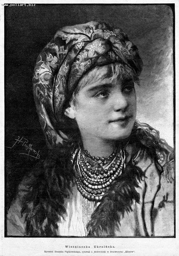 Józef Holewiński. "Wieśniaczka Ukraińska"